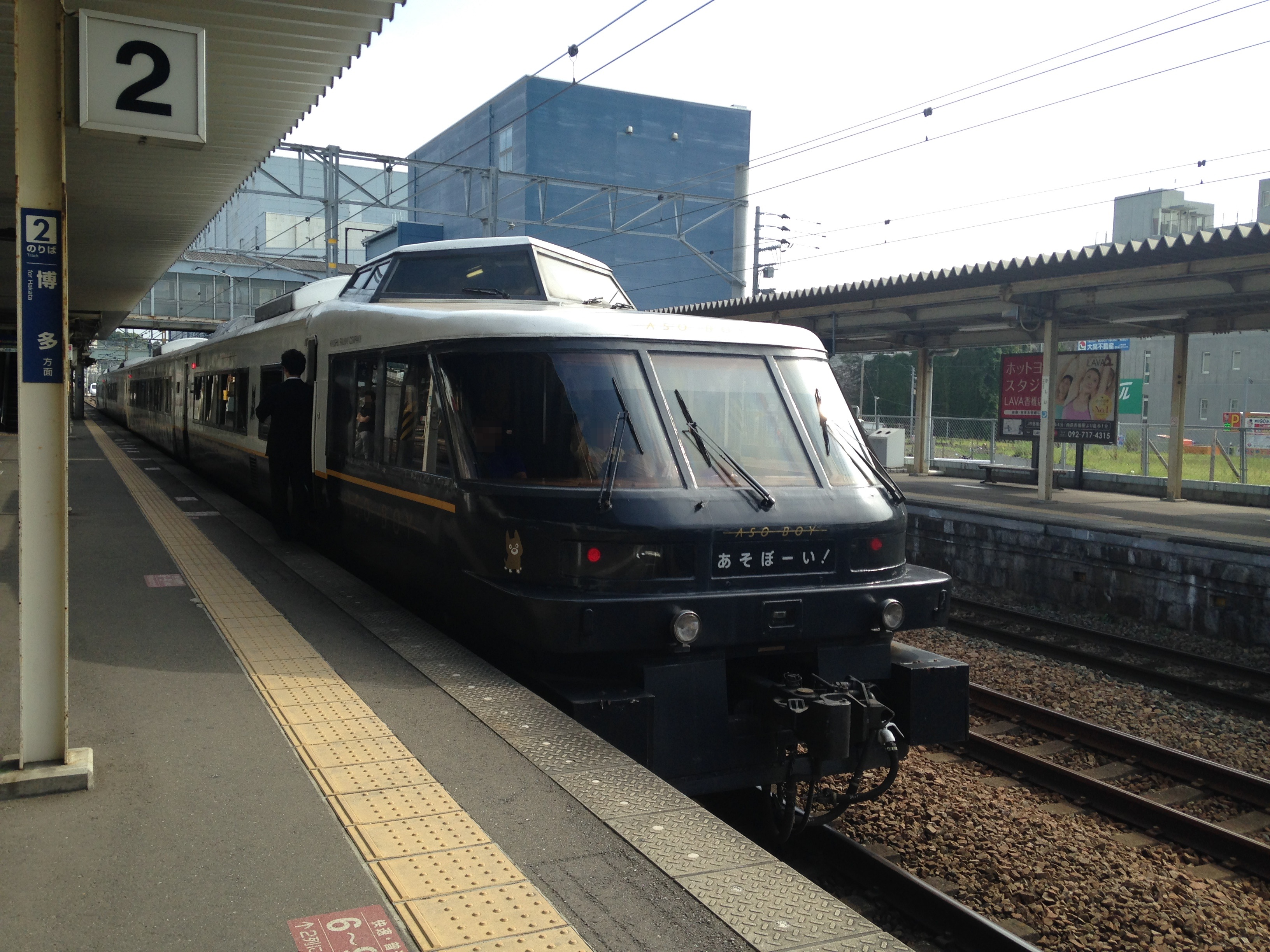 香椎駅にて停車中の「あそぼーい!」